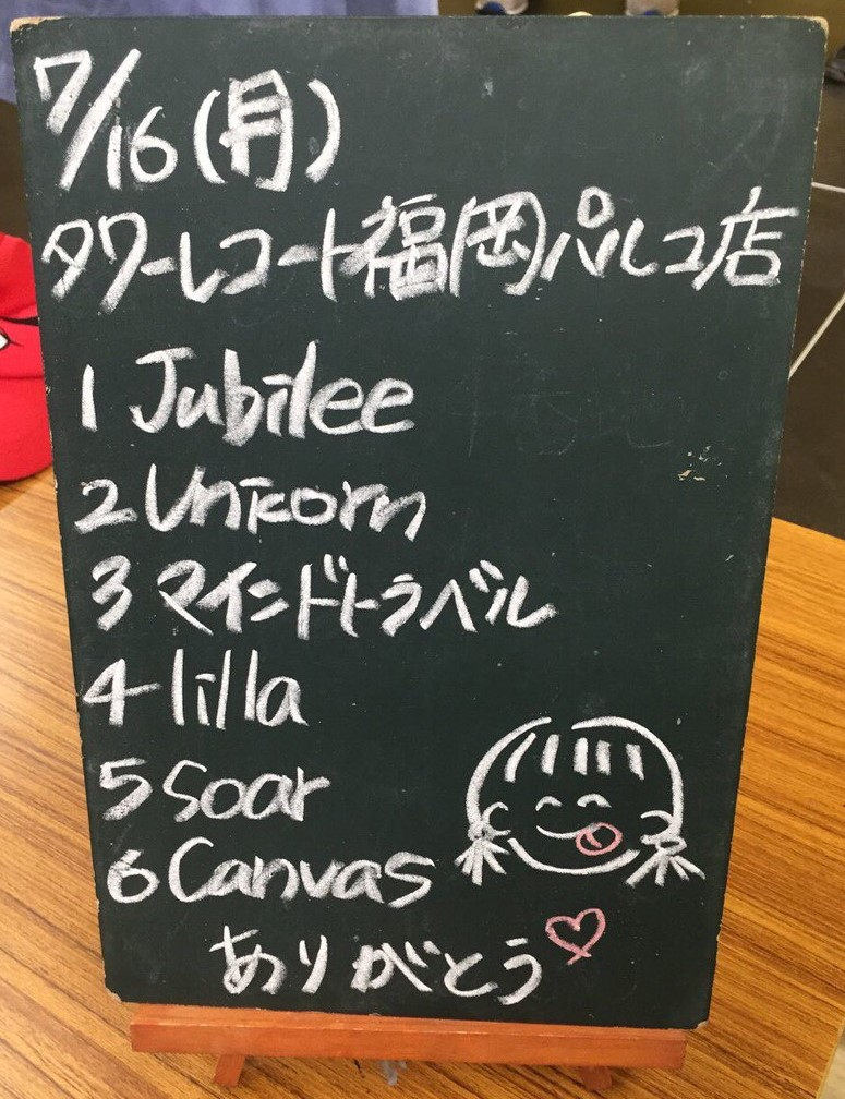 amiinAセトリボード(20180716(1))